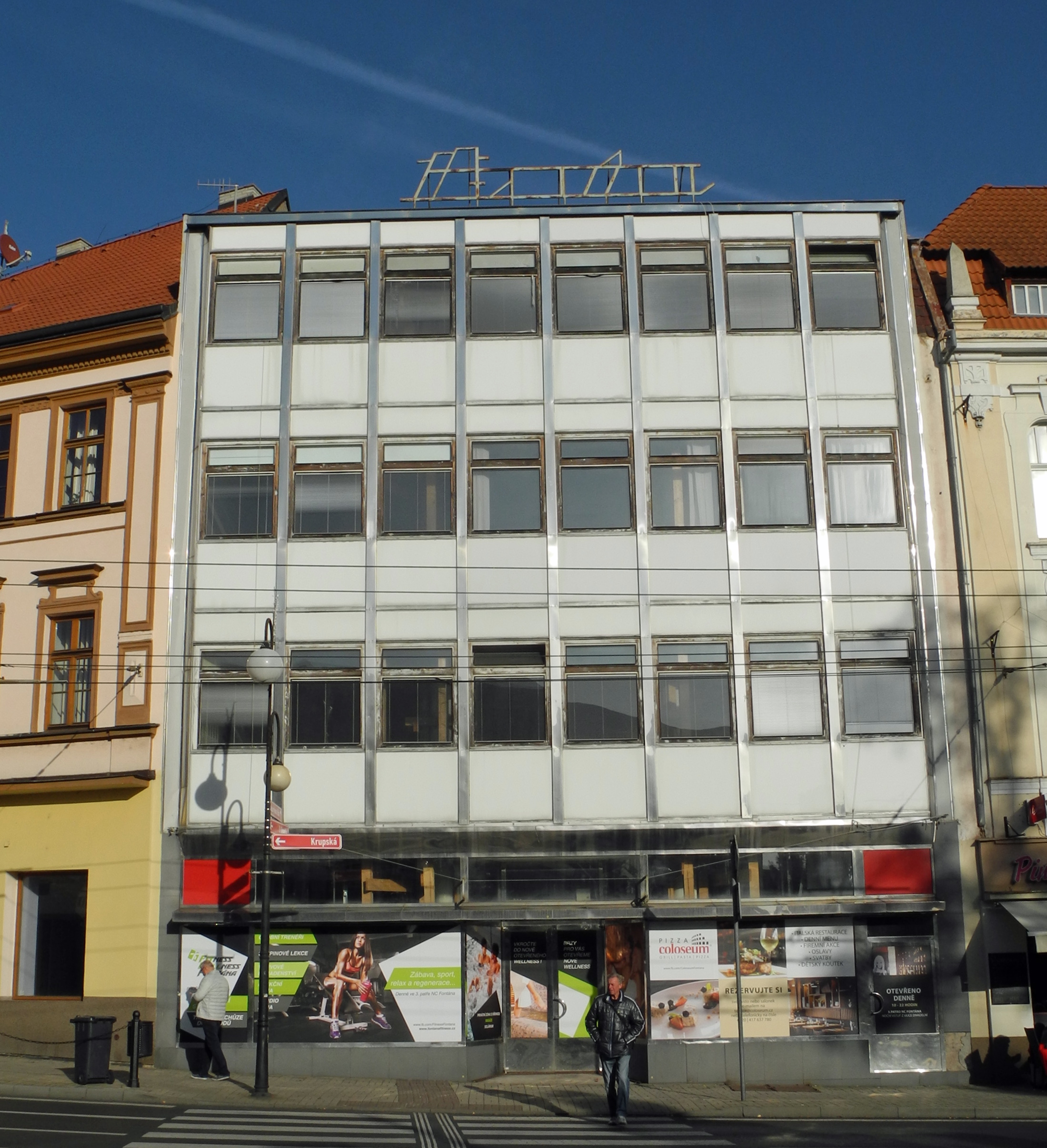 Geschäftshaus - ehem. Baťa-Haus in Teplice, U Císařských lázní 366/3 (früher Teplitz, Königsstraße)